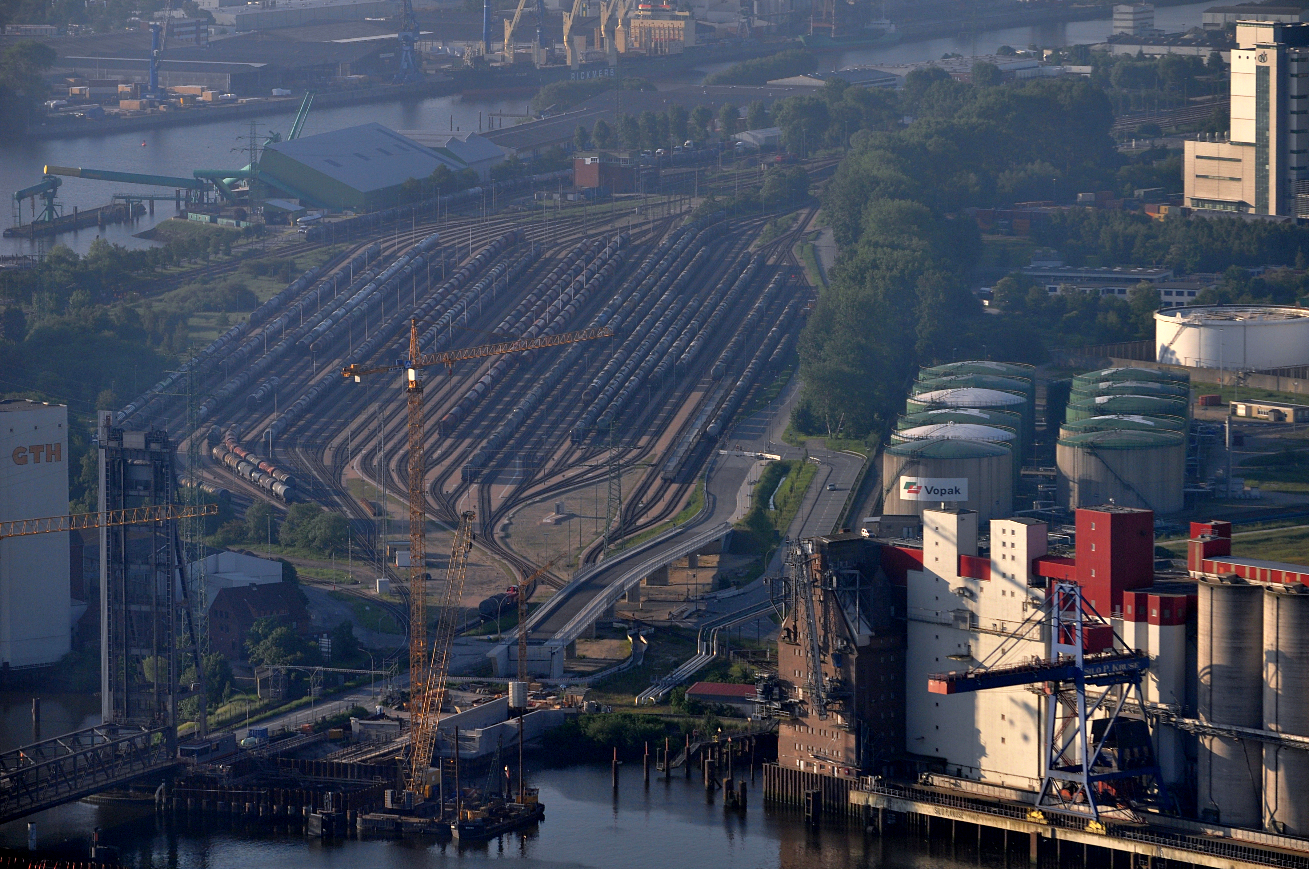 Hafenbahnhof Hohe Schaar auf der Elbinsel Hohe Schaar in Hamburg-Wilhelmsburg, links die Rethebrücke.